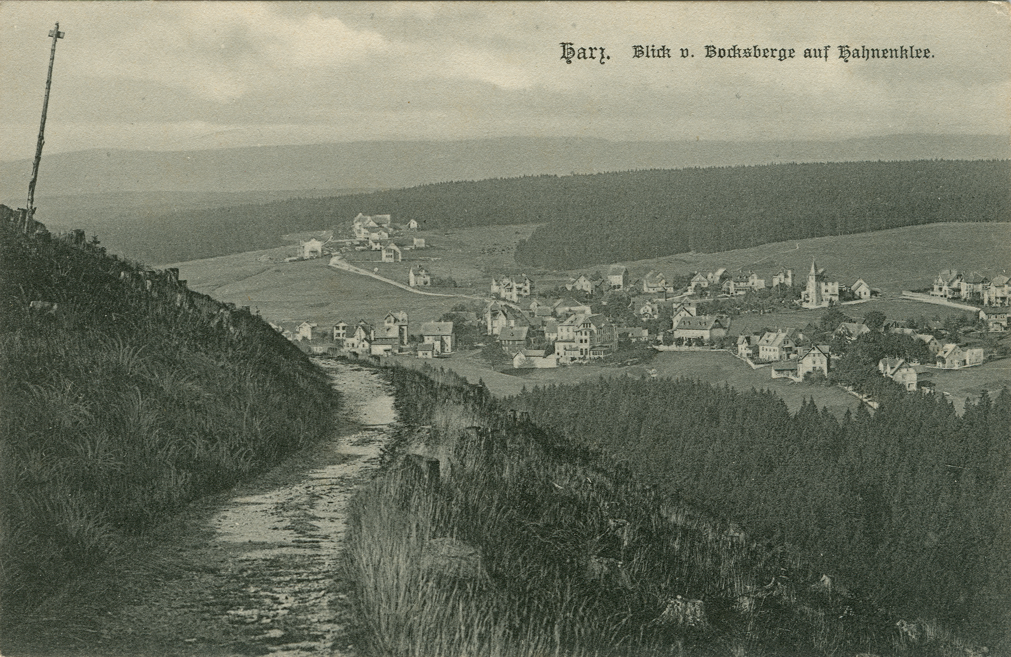 Fotografien von Karl Friedrich Wunder mit Vor- und Rückseite